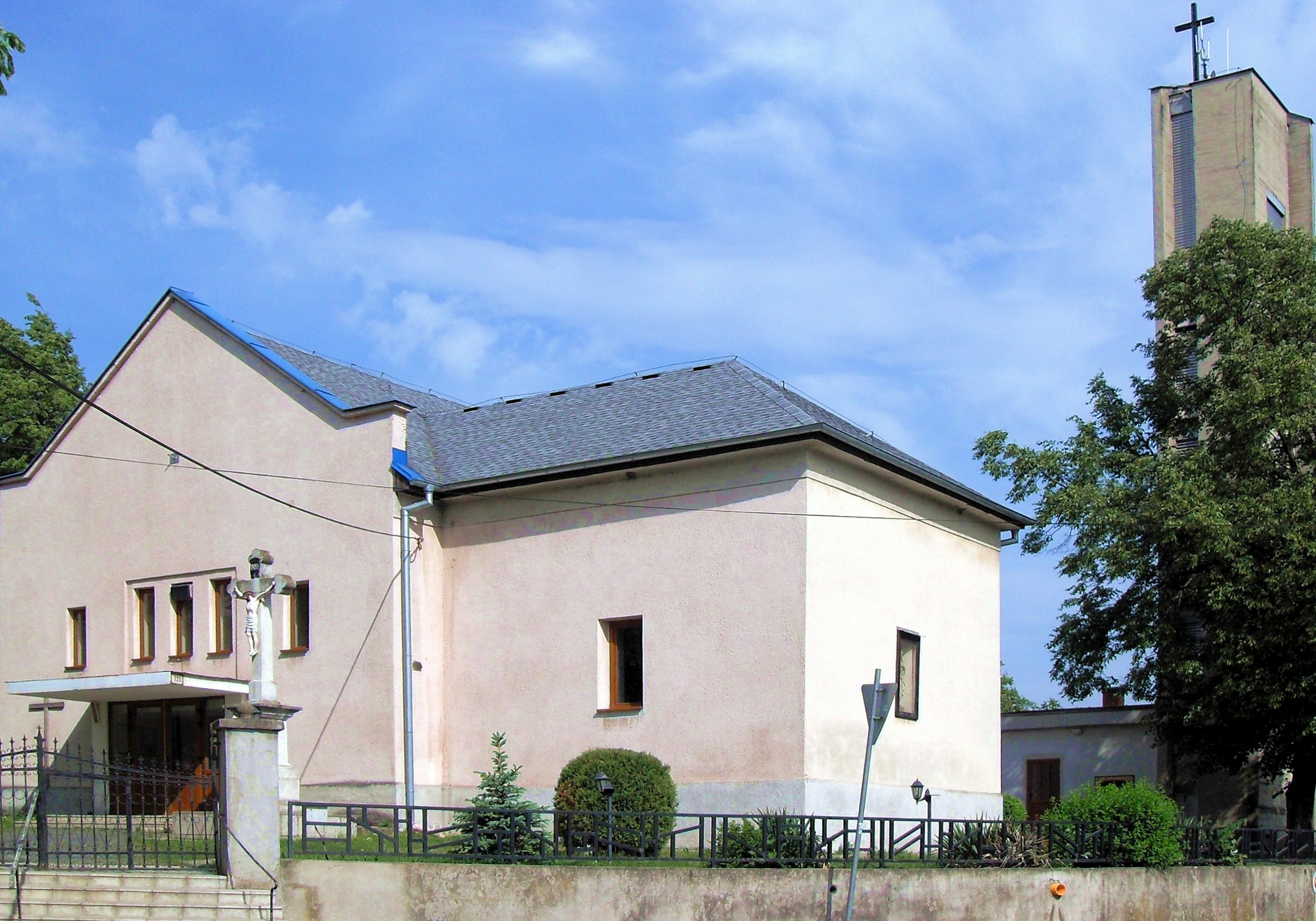 Sokoľany, Rímskokatolícky kostol Ružencovej Panny Márie